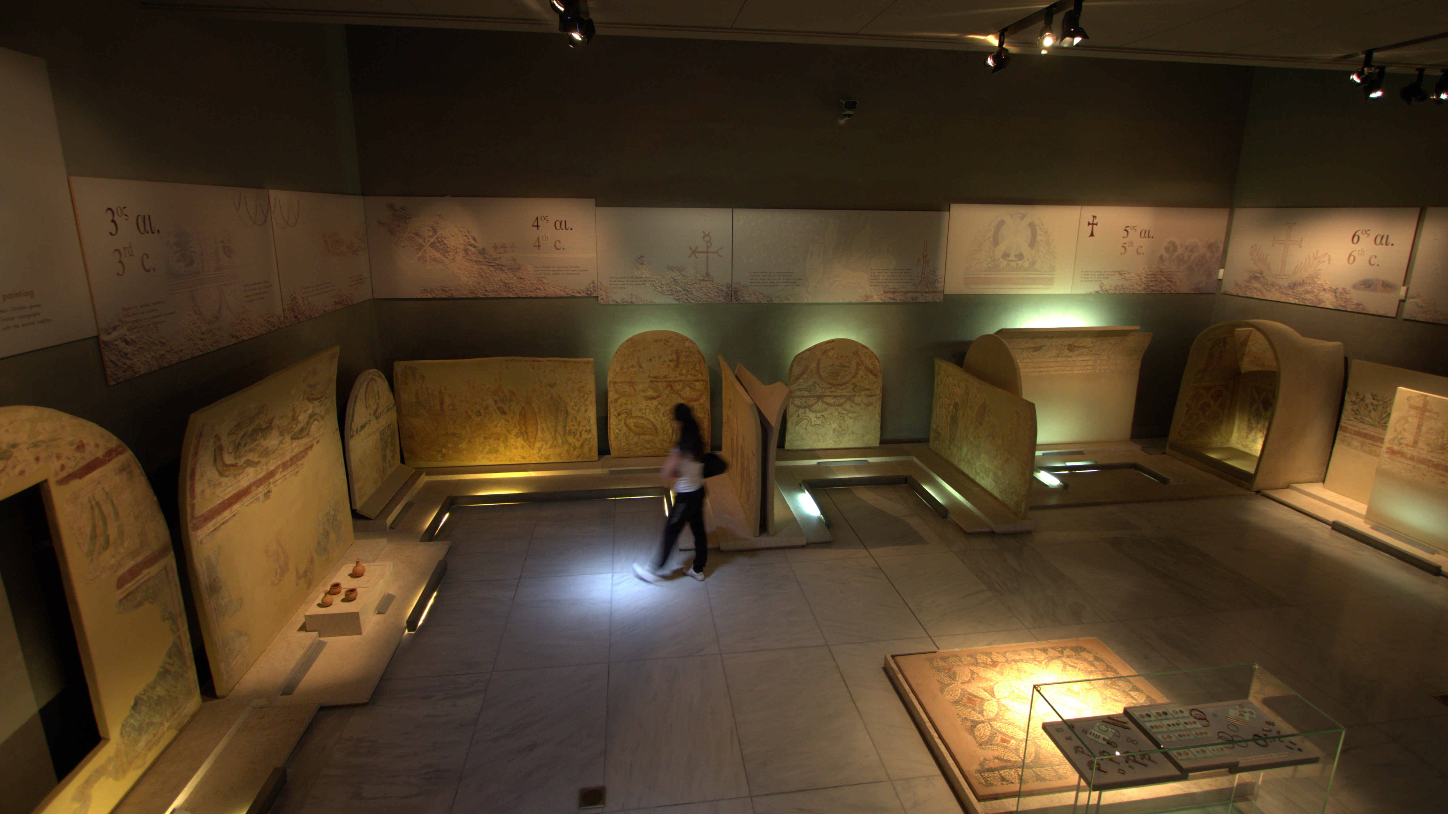 Μουσείο Βυζαντινού Πολιτισμού, Θεσσαλονίκη.